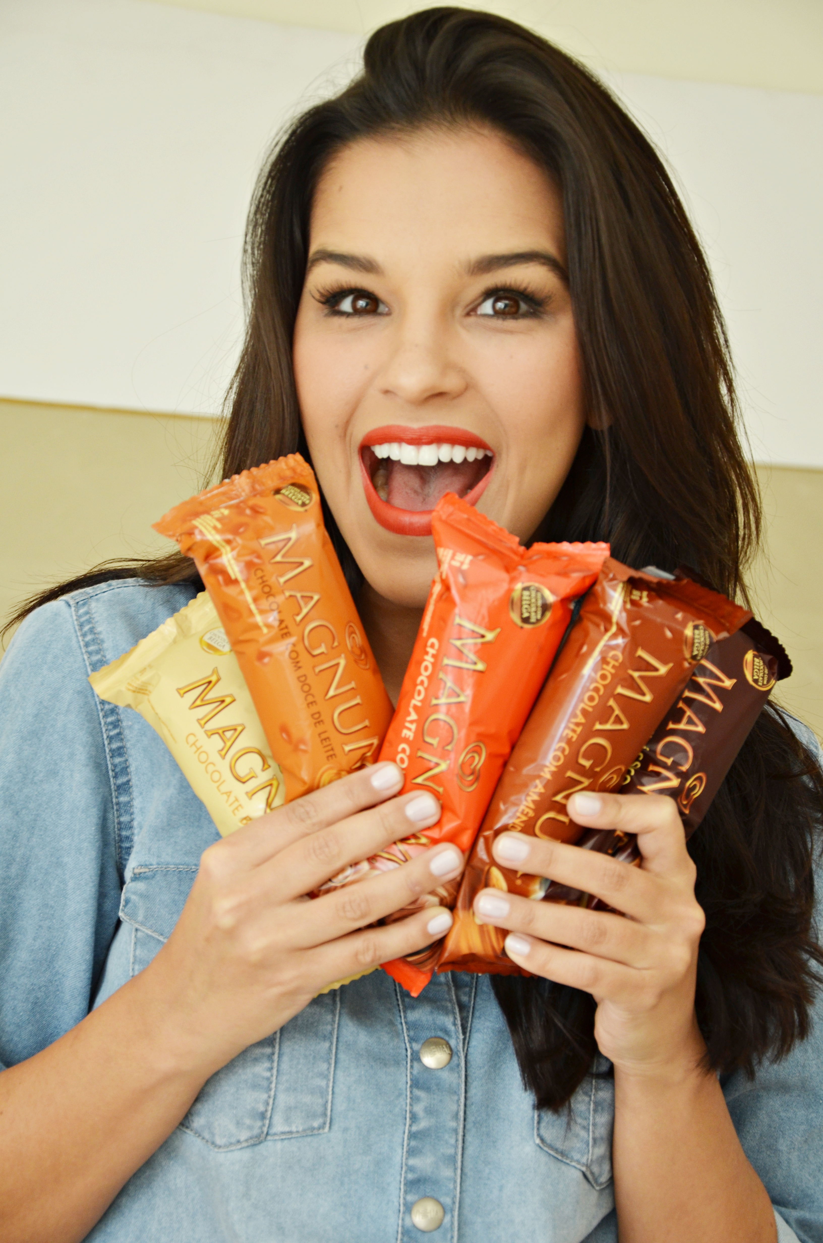 Mariana Rios BLOG OUT by Felipe Pilotto 066